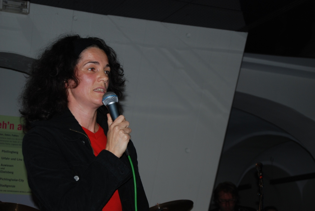 Maria Buchmayr am Sommer fest der Grünen Linz